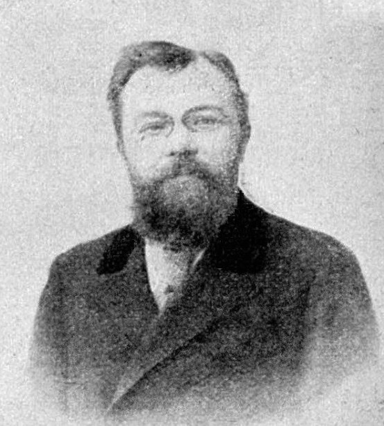 André Michelin en 1898 - L'Almanach des Sports 1899 sous la direction de Maurice Leudet , librairie Paul Ollendorff, p.130